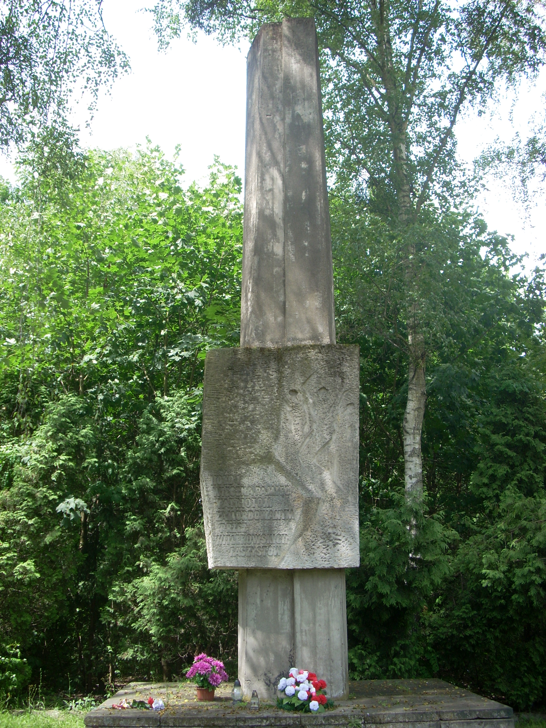 Pomnik zamordowanych przez hitlerowców w Forcie III Twierdzy Modlin